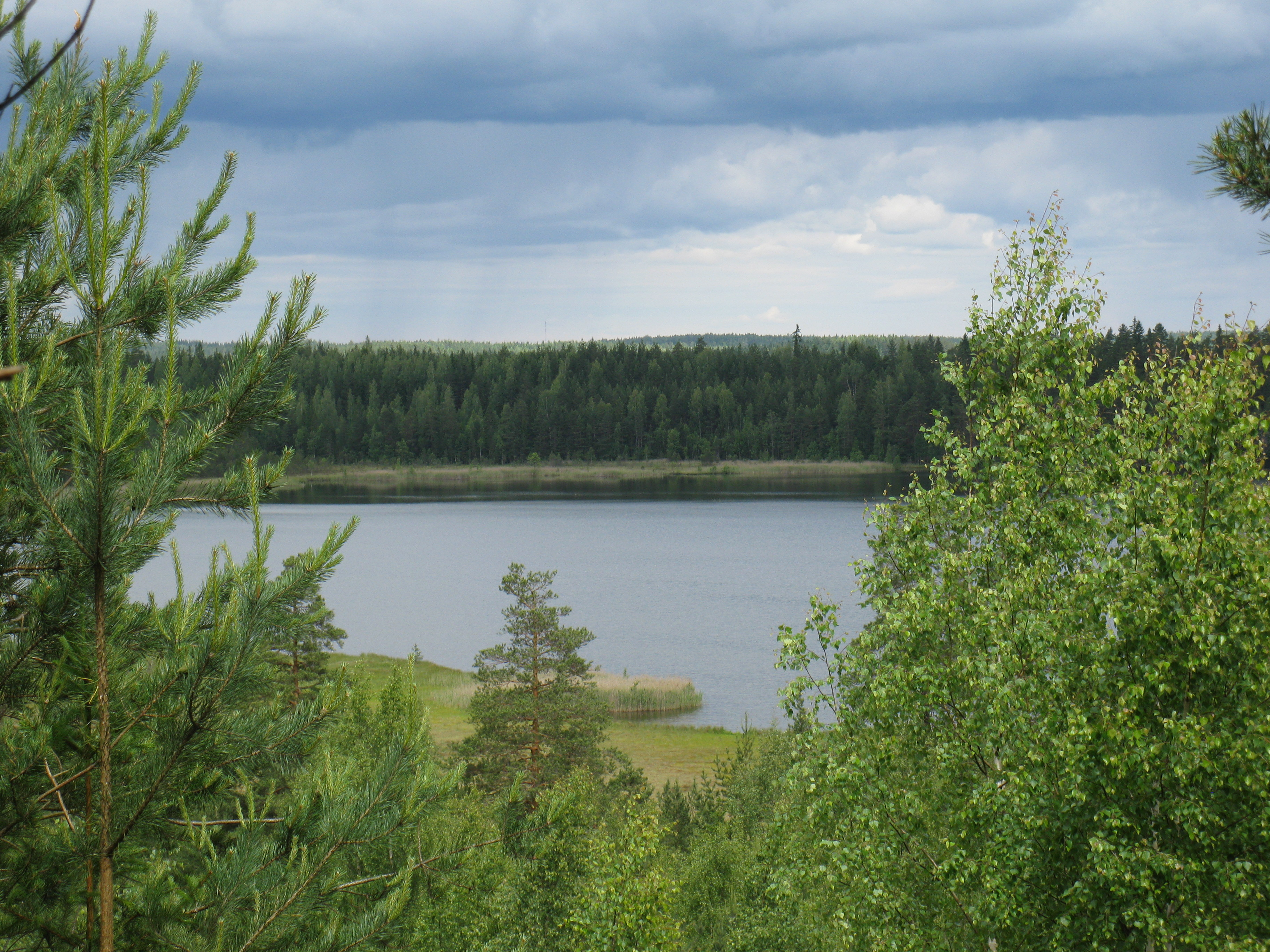 Lammenjärveä Kiikalassa Salossa